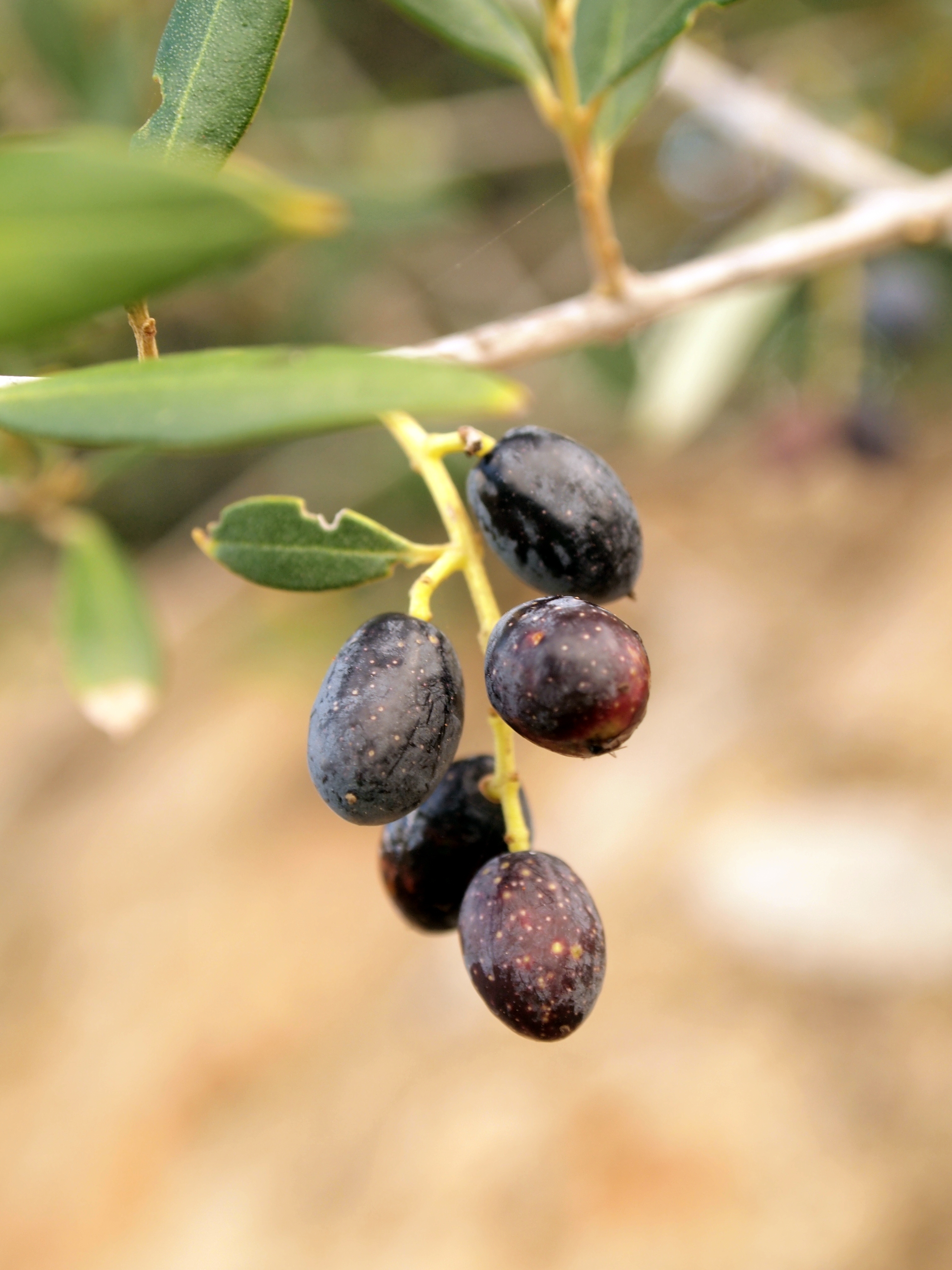 Fruit madur de l'ullastre (Olea europaea varietat silvestris)